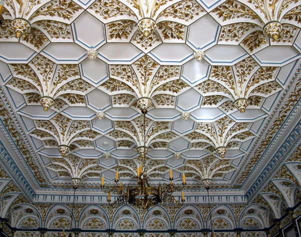 Strop w sali białej, Pałac w Starejwsi, fot. Goto (Tomasz Goździewicz) 26.05.2003 r.